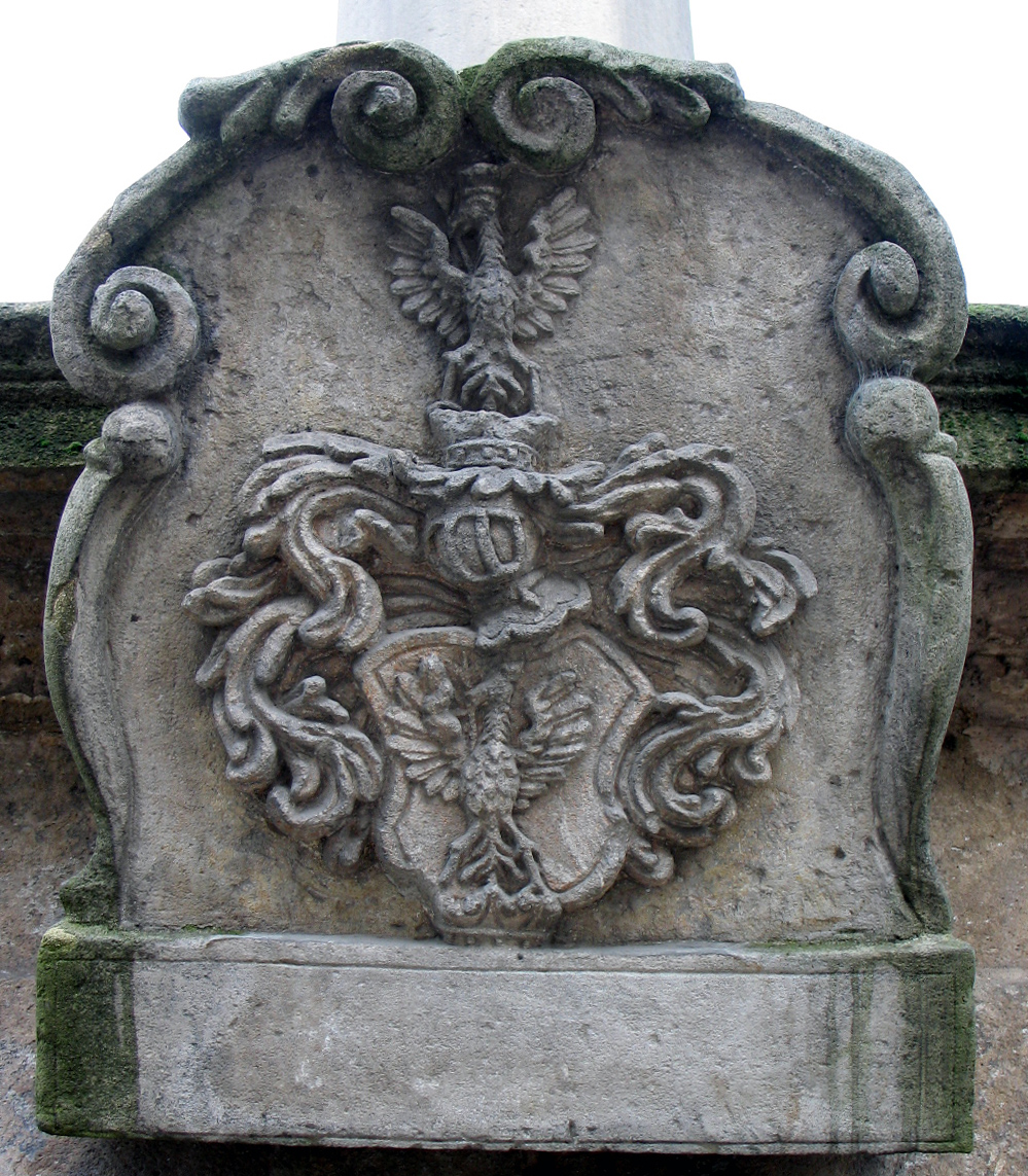 Historický erb na morovom stĺpe v Trenčíne z roku 1720